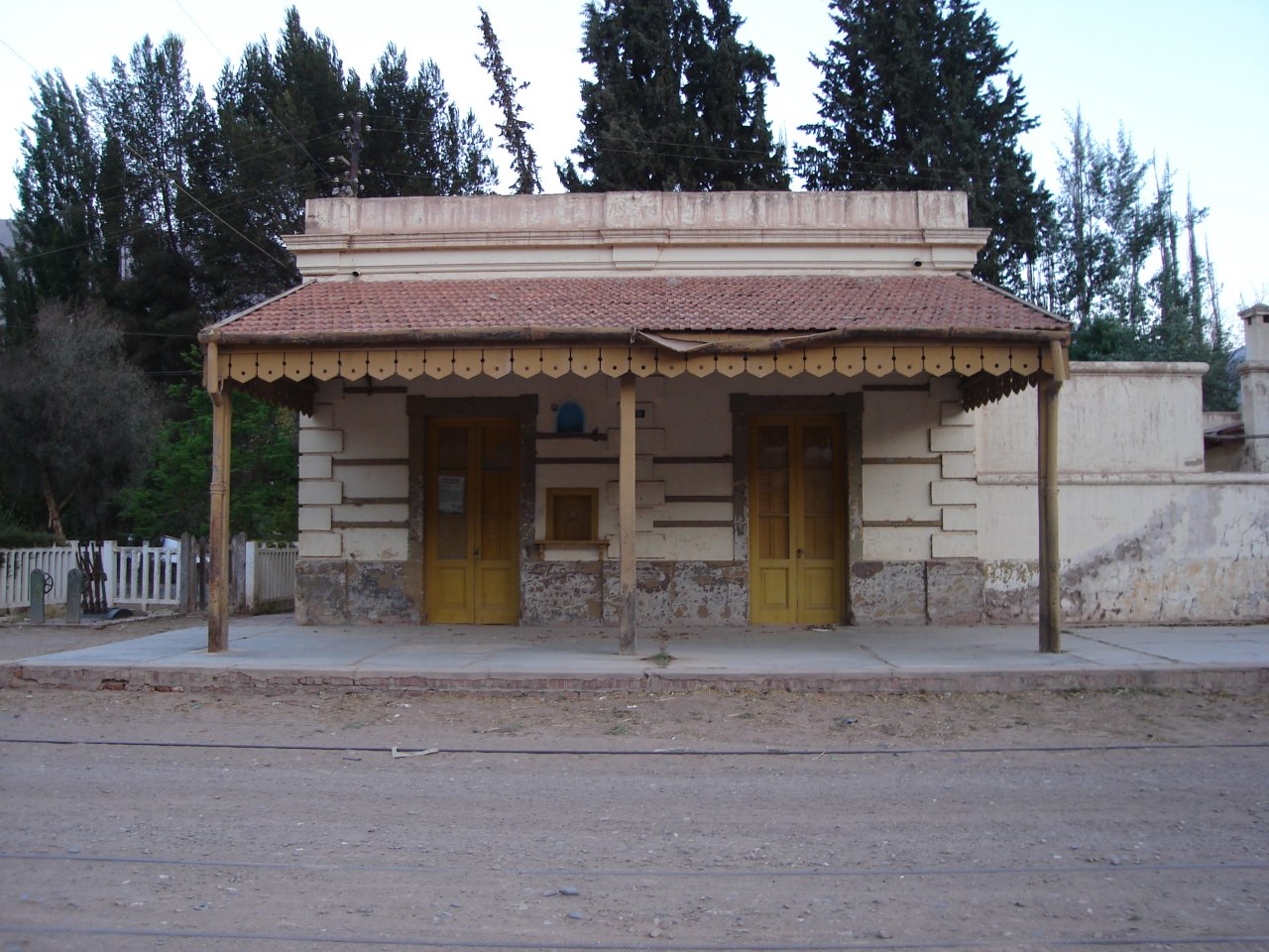 Edificio de la estación Tilcara del Ferrocarril Belgrano, en la Provincia de Jujuy.